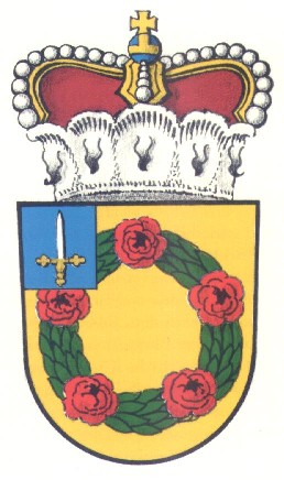 Wappen der Fürsten von Wrede (seit 1814)